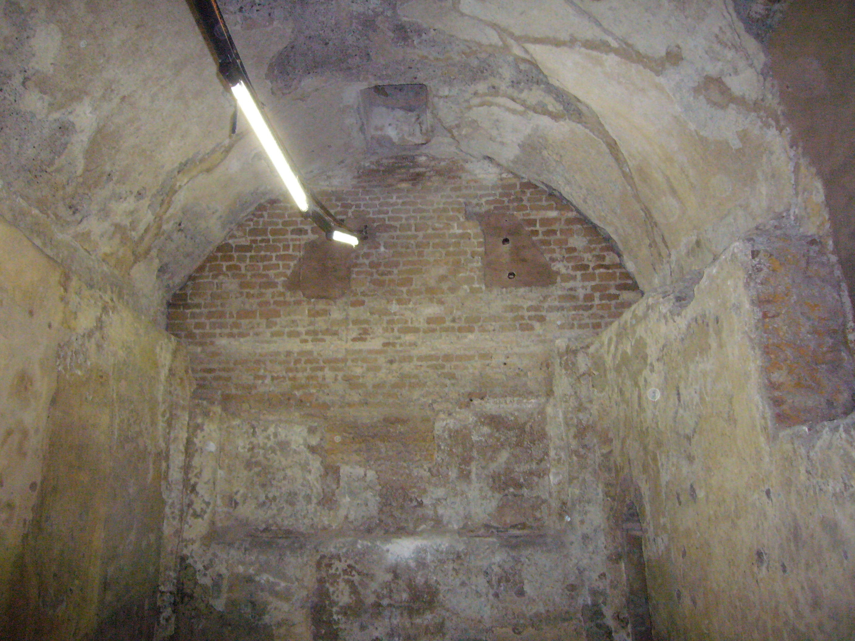 Roma, scavi di santa Sabina: mura serviane inglobate (l'ambiente fu poi utilizzato come cisterna)